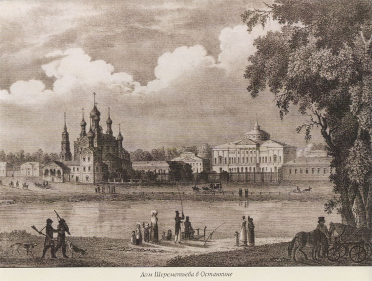 House of Sheremetyev in Ostankino Дом Шереметьевых в Останкино